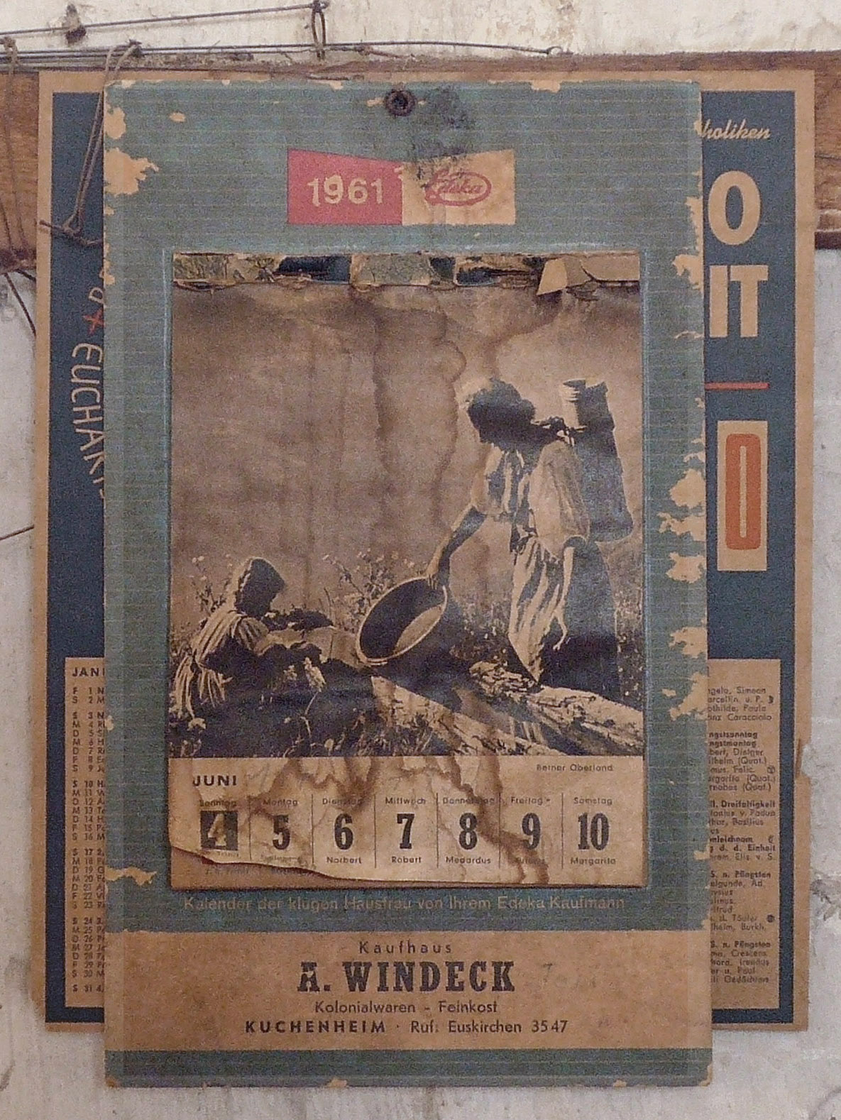 Kalender aus der letzten Betriebswoche der Tuchfabrik Müller (Juni 1961), der in Fabrik unverändert hängenblieb.